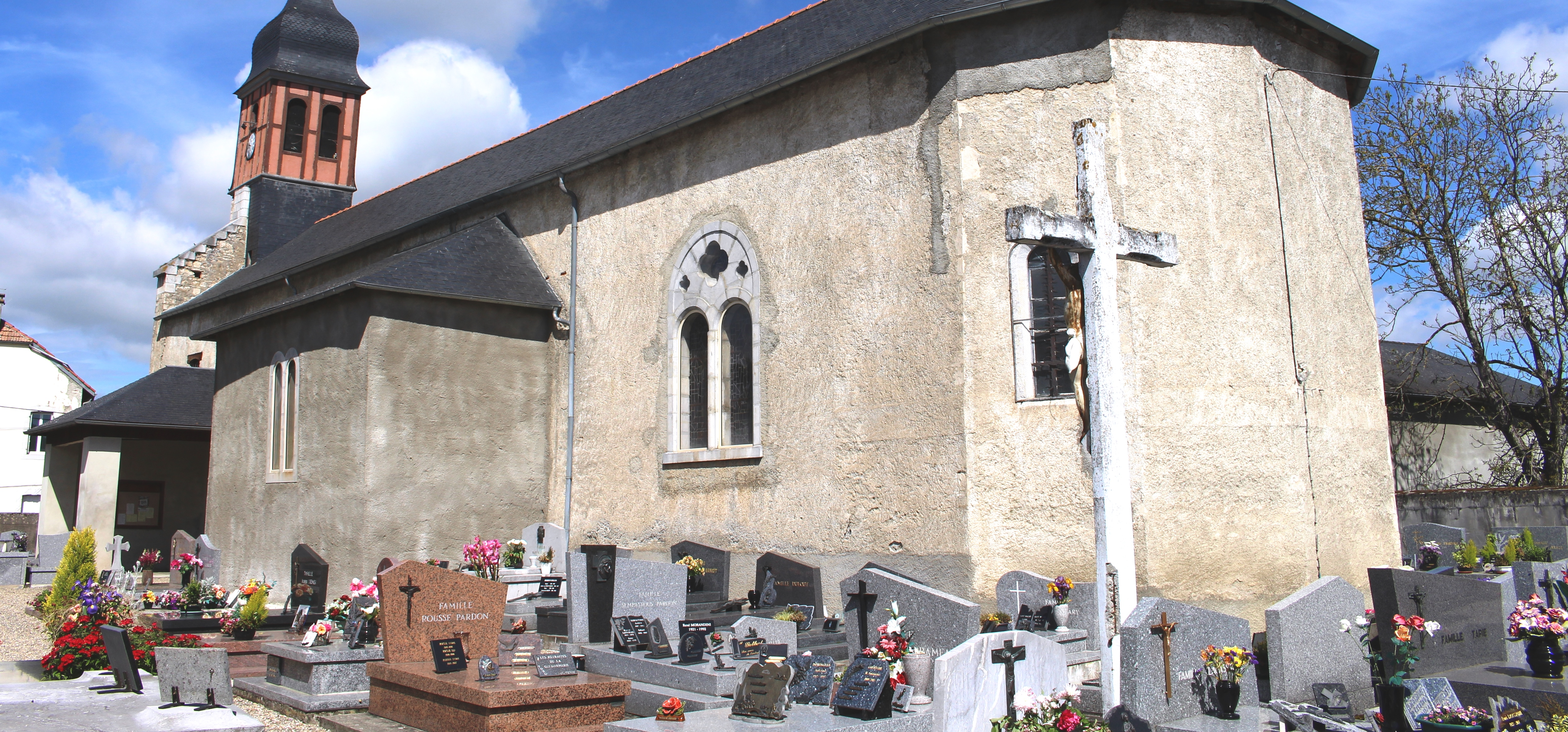 Cimetière de Bernac-Debat (Hautes-Pyrénées)